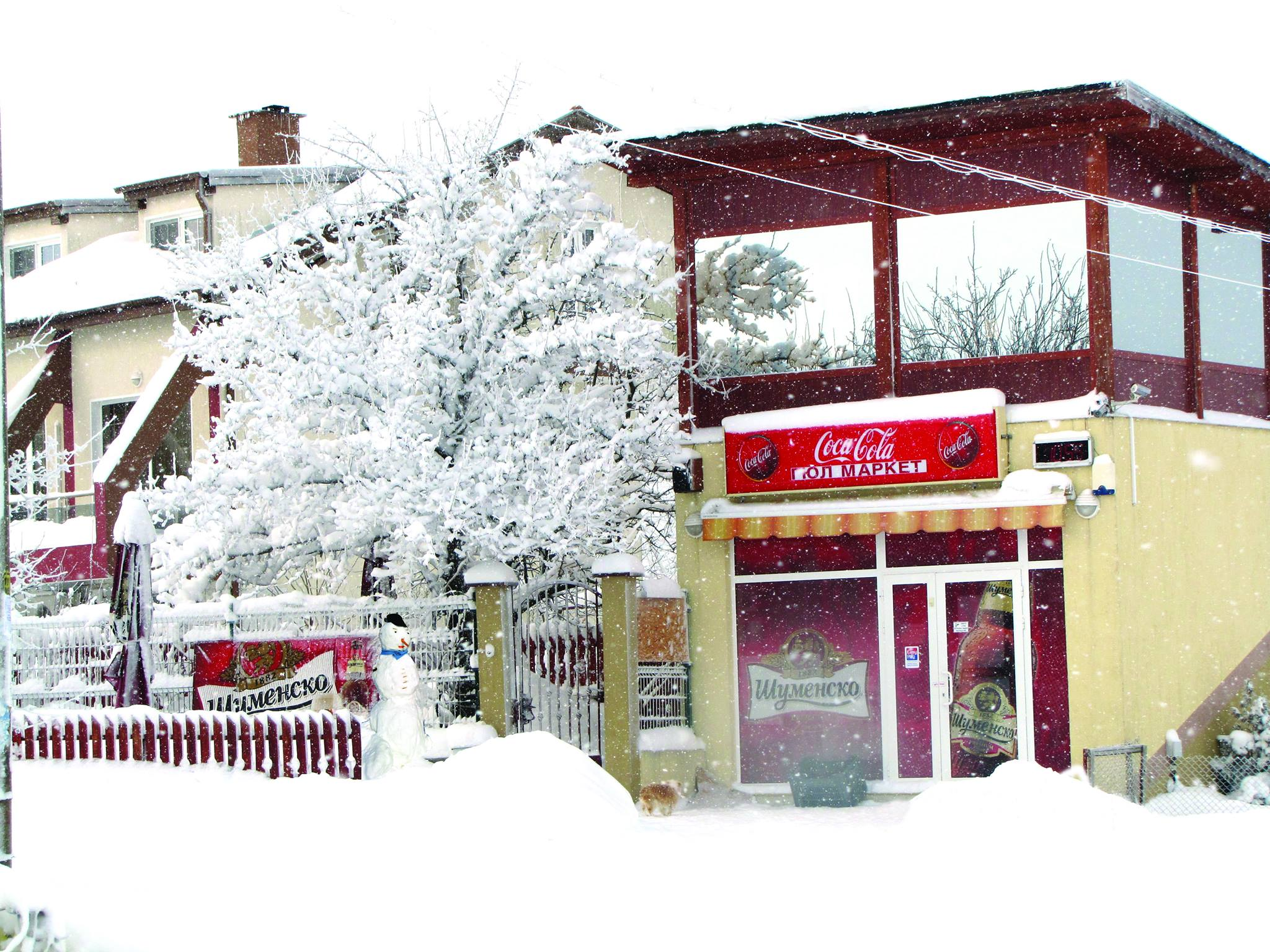 Зима в с. Козма Презвитер